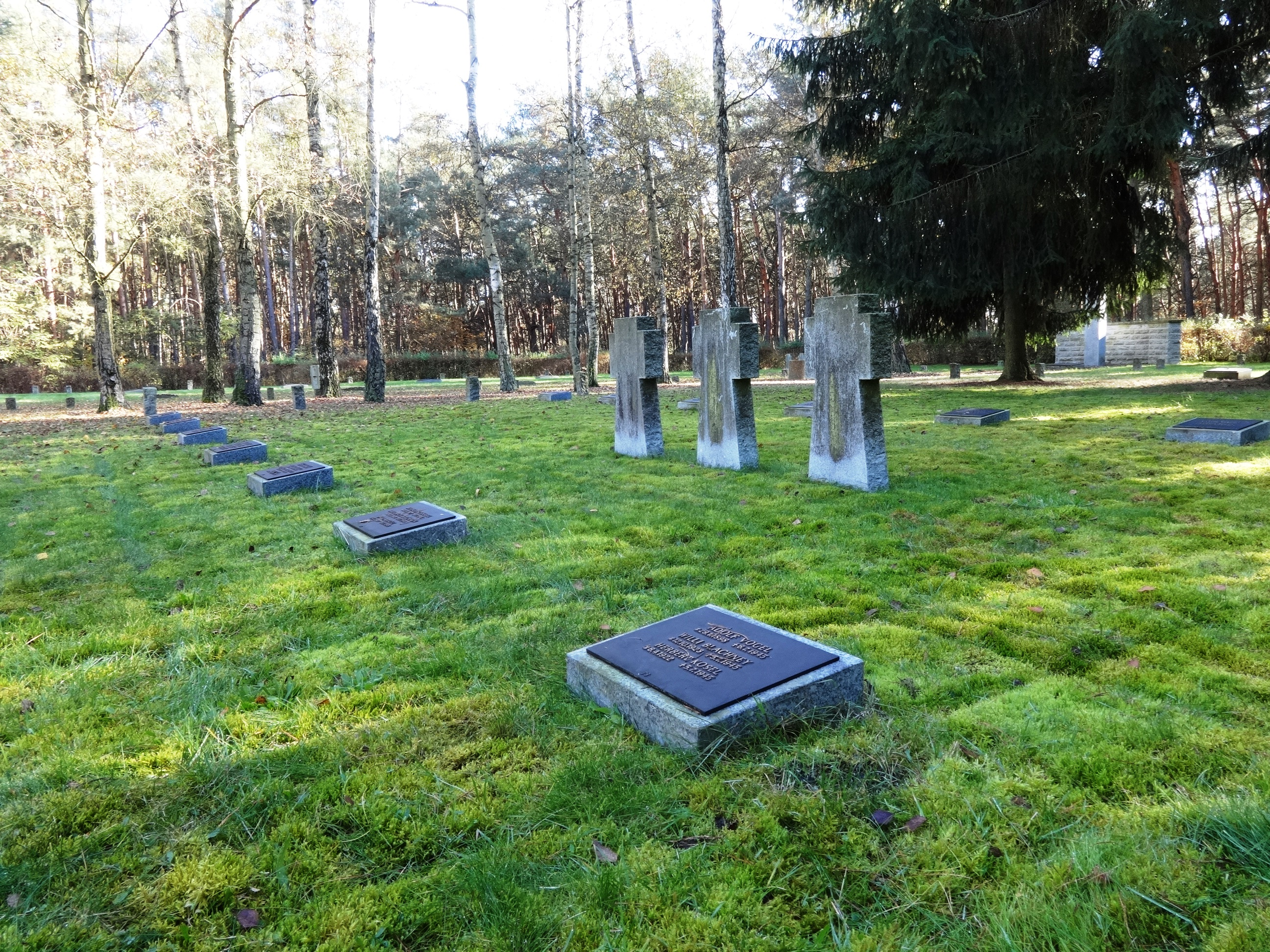 Auf dem Lazarettfriedhof in Saalow wurden 1033 Opfer aus dem Zweiten Weltkrieg begraben: 331 Soldaten der deutschen Wehrmacht sowie 702 Flüchtlinge.